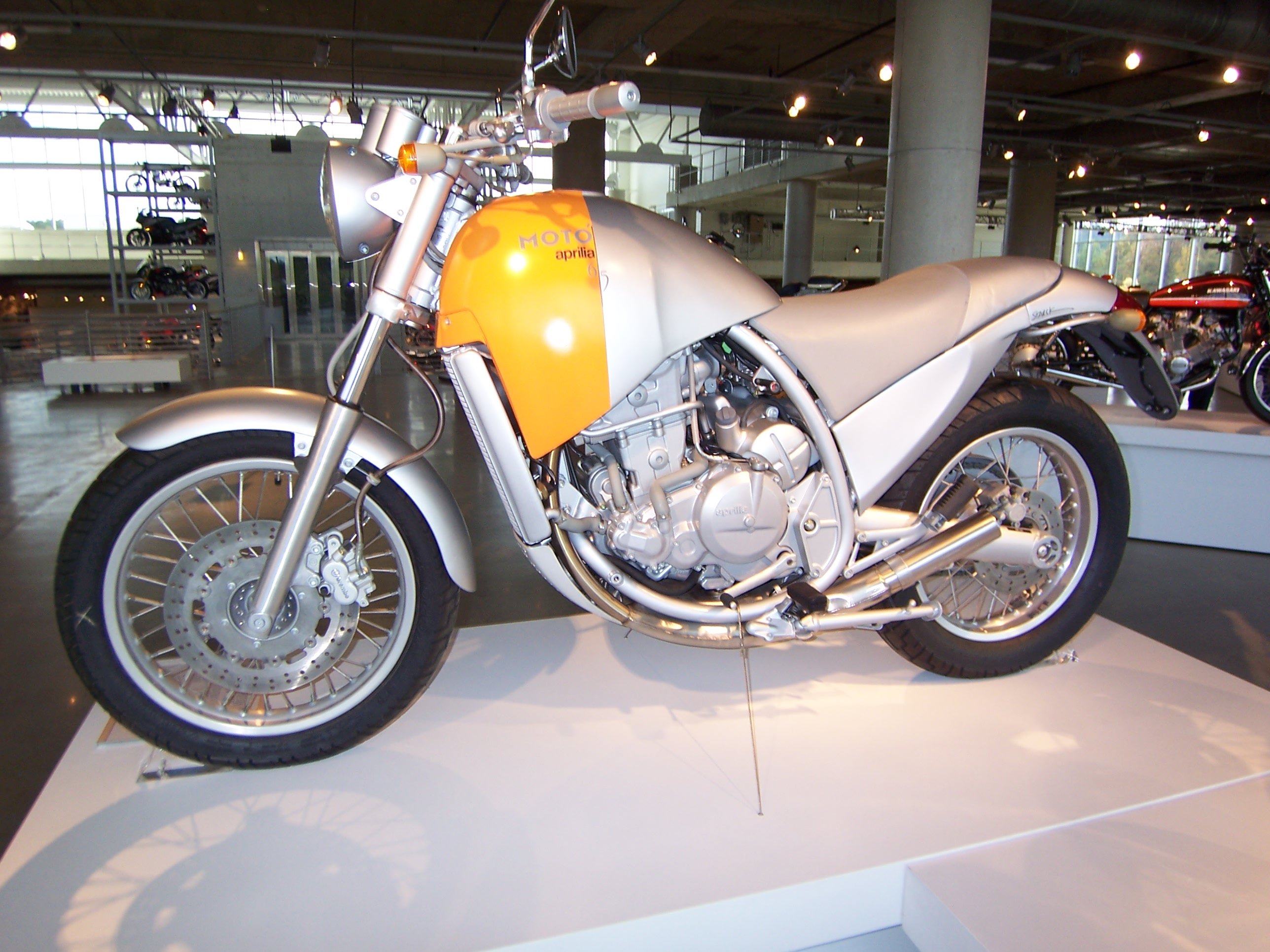 Aprilia 6.5 Moto